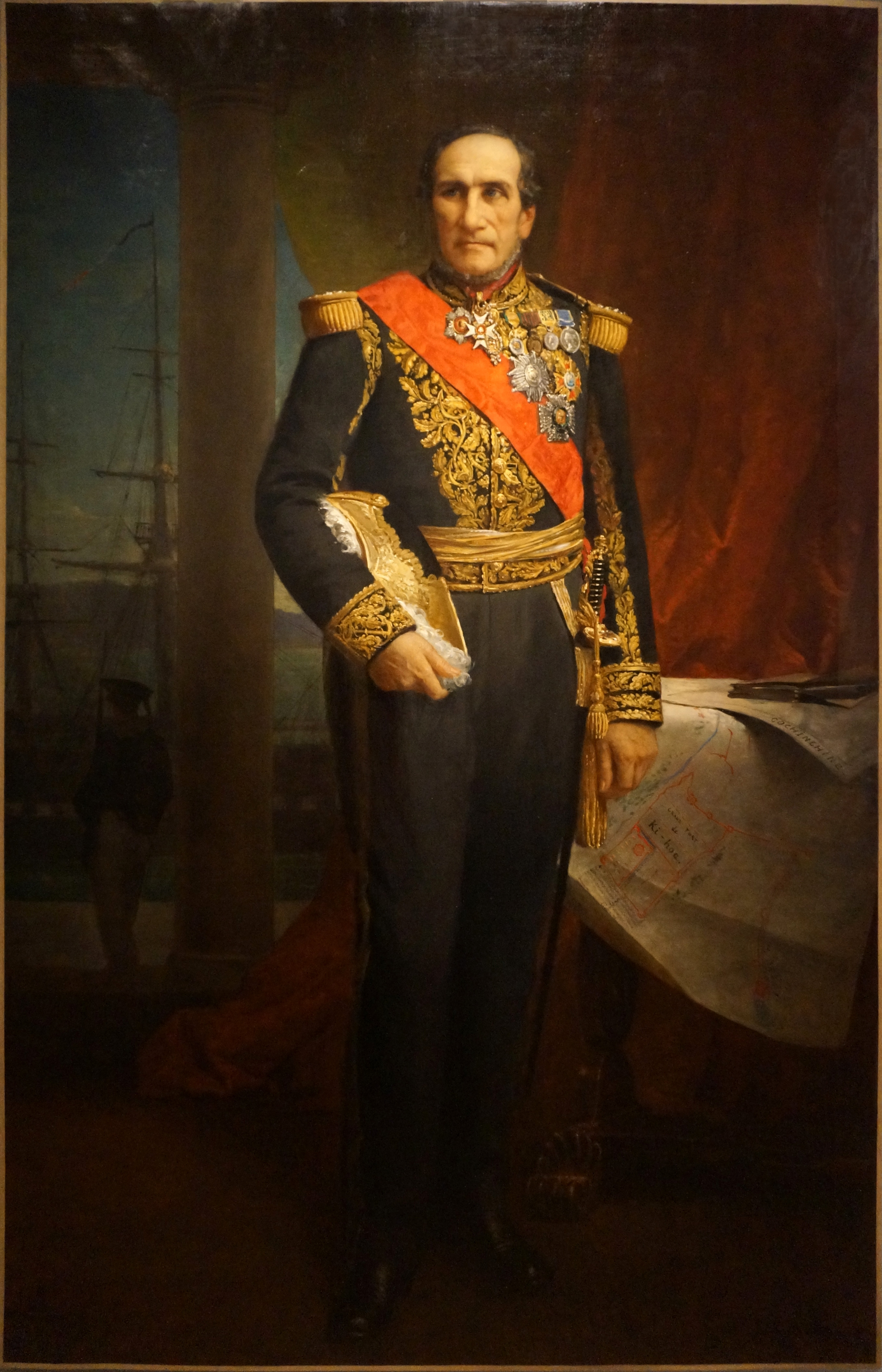 Présenté lors de l'exposition Indochine des territoires et des hommes 1856 1956.